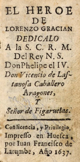 Primera edición de: Baltasar Gracián, El héroe (El heroe de Lorenzo Gracian ; dedicado a la S.c.R.M. del rey Don Phelipe el IV, Don Vicencio de Lastanosa ...), ed. de Juan Francisco de Larumbe, Huesca, 1637. Edición en octavo.